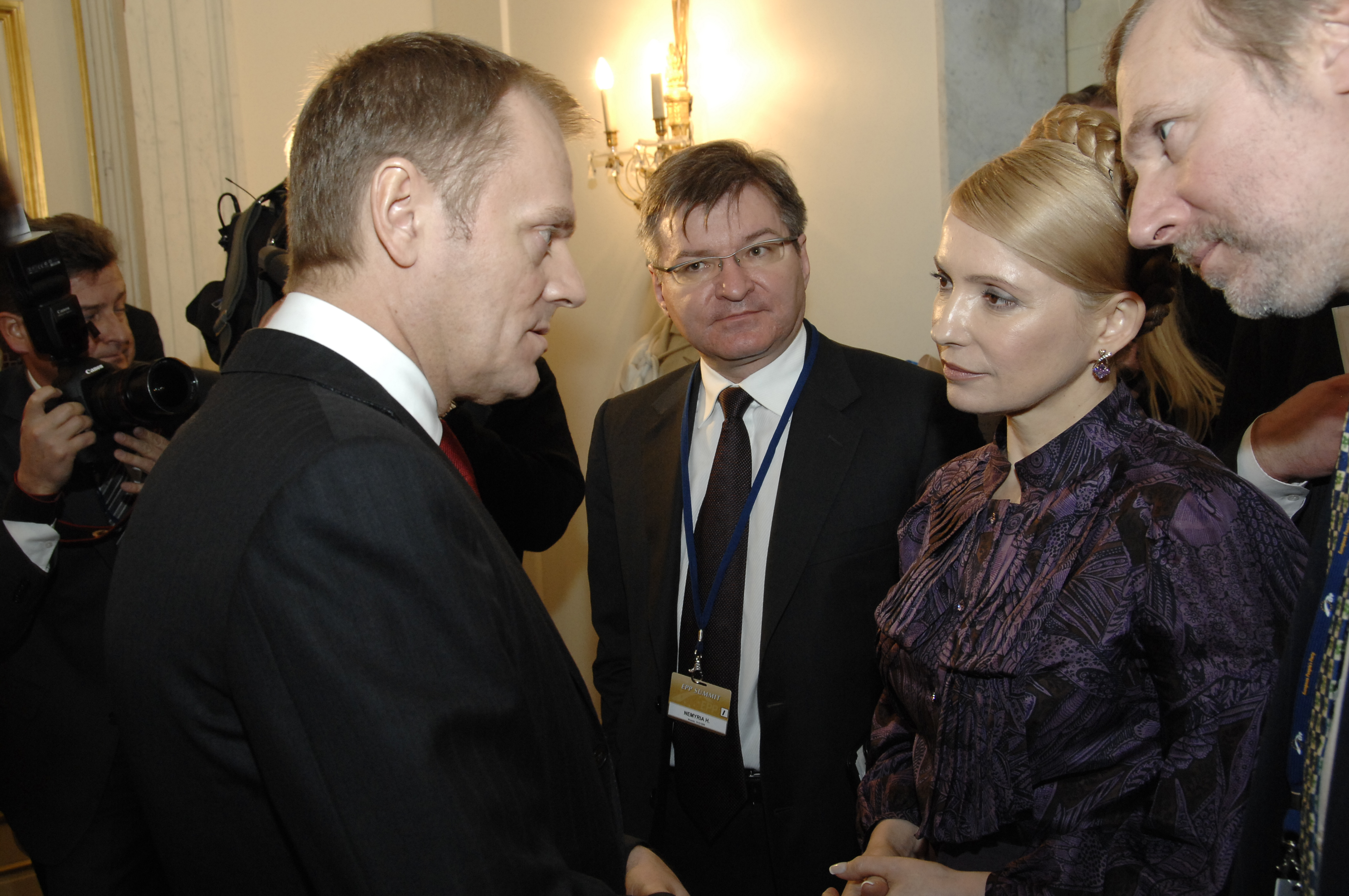 EPP Summit 19 March 2009